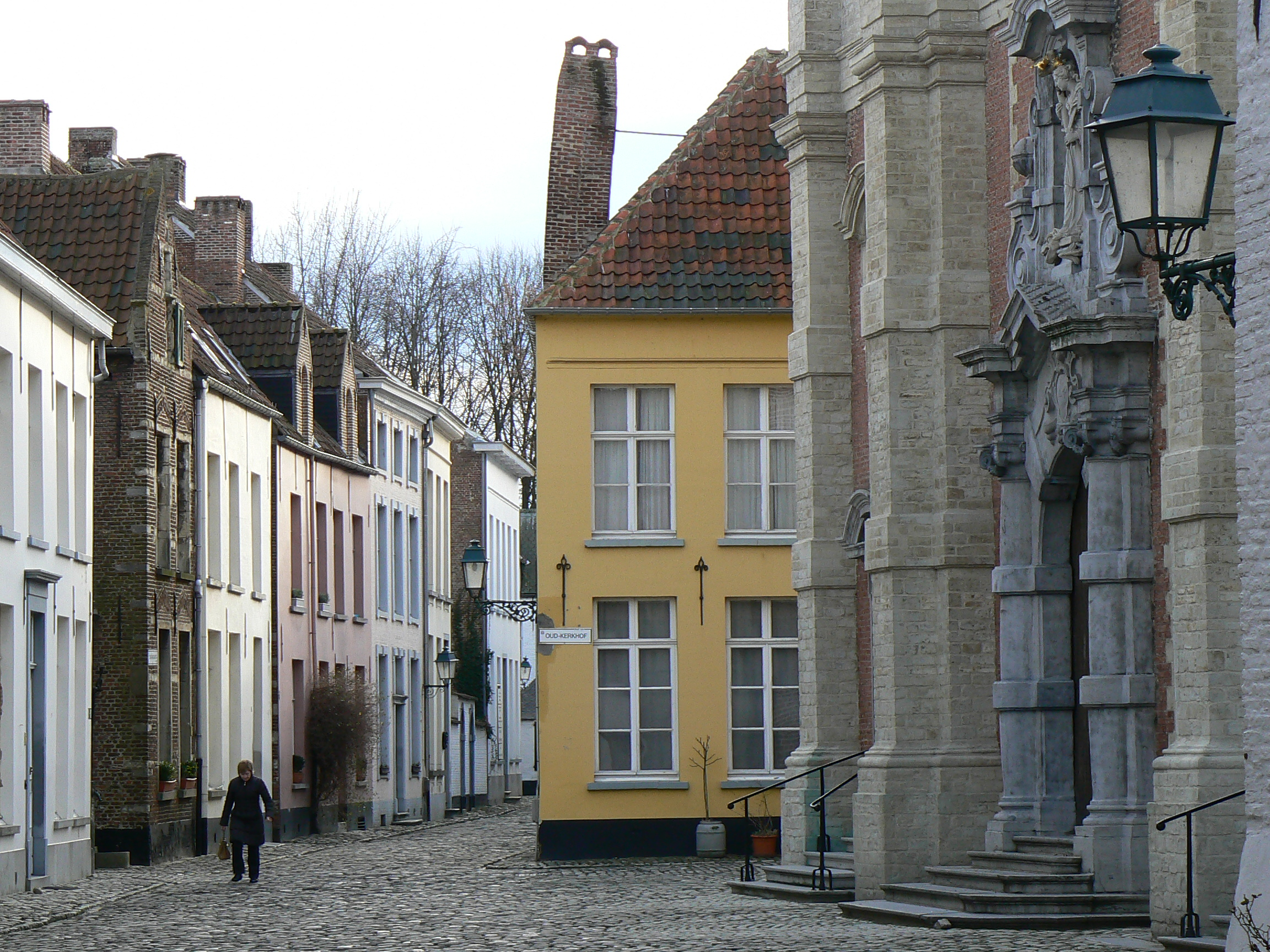 Beguinage of Lier, Flanders, Belgium